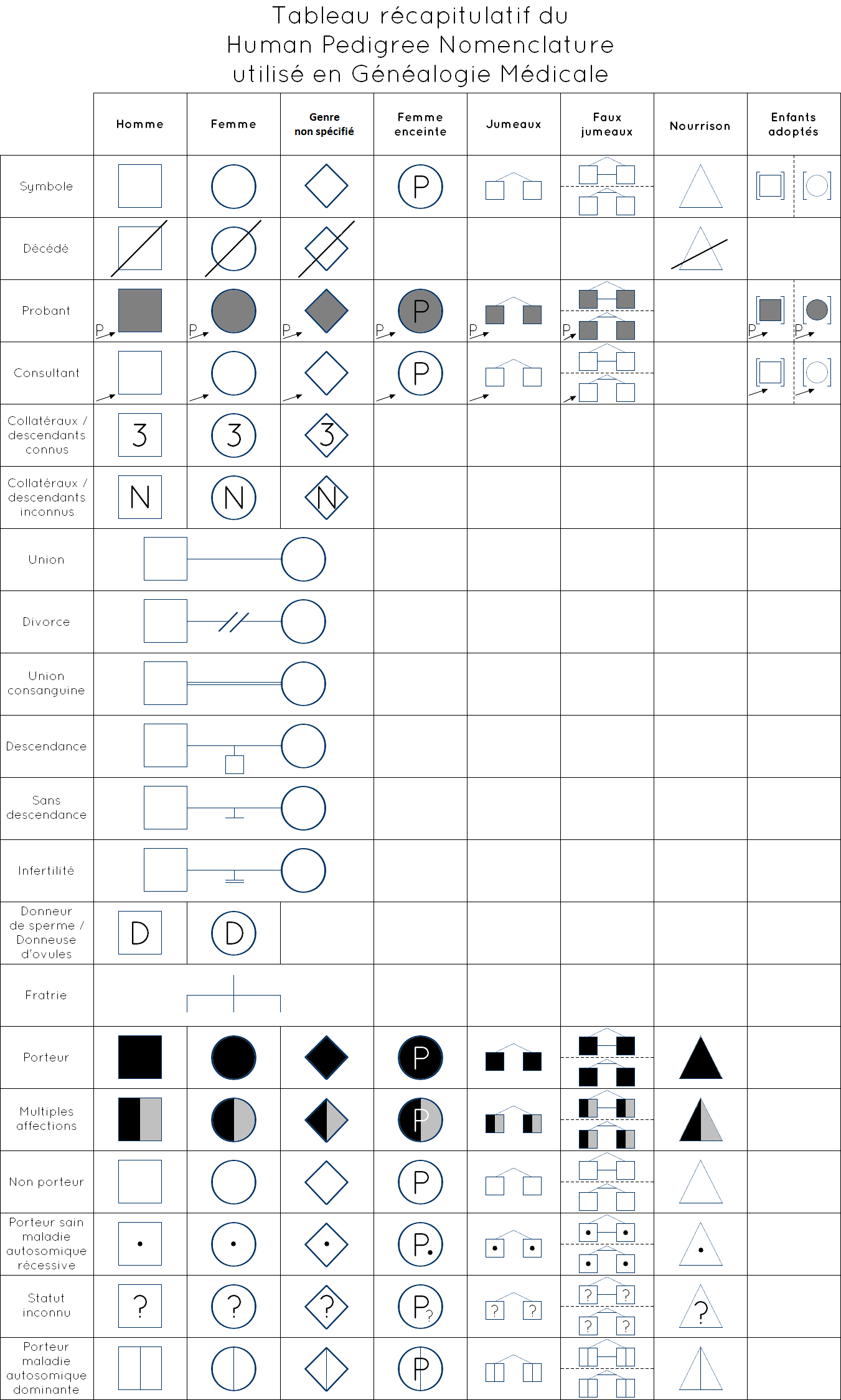 Récapitulatif du protocole Human Pedigree Nomenclature en Généalogie Médicale.